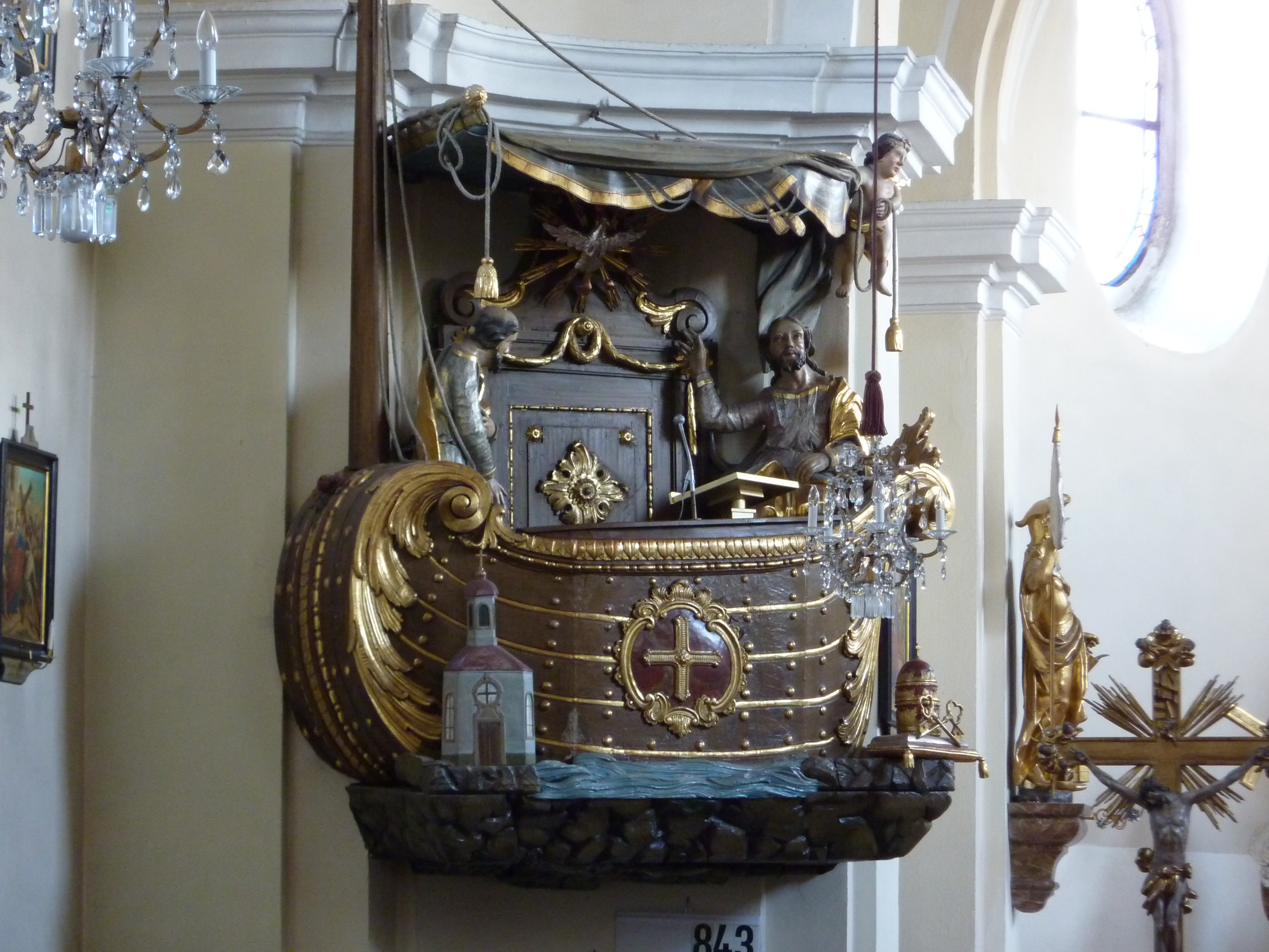 Pfarrkirche hl. Josef, Tautendorf, Gars am Kamp, Niederösterreich - Fischerkanzel